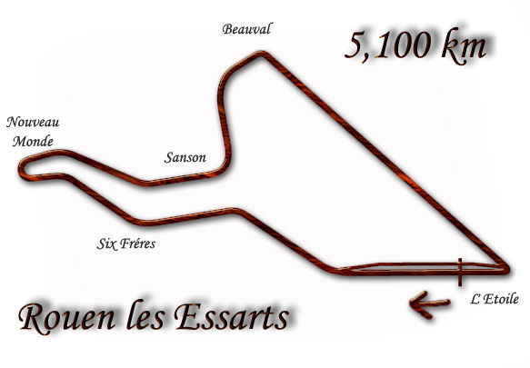 Plánek trati Grand Prix Francie (Zařazený do mistrovství světa Formule 1 v roce 1952).